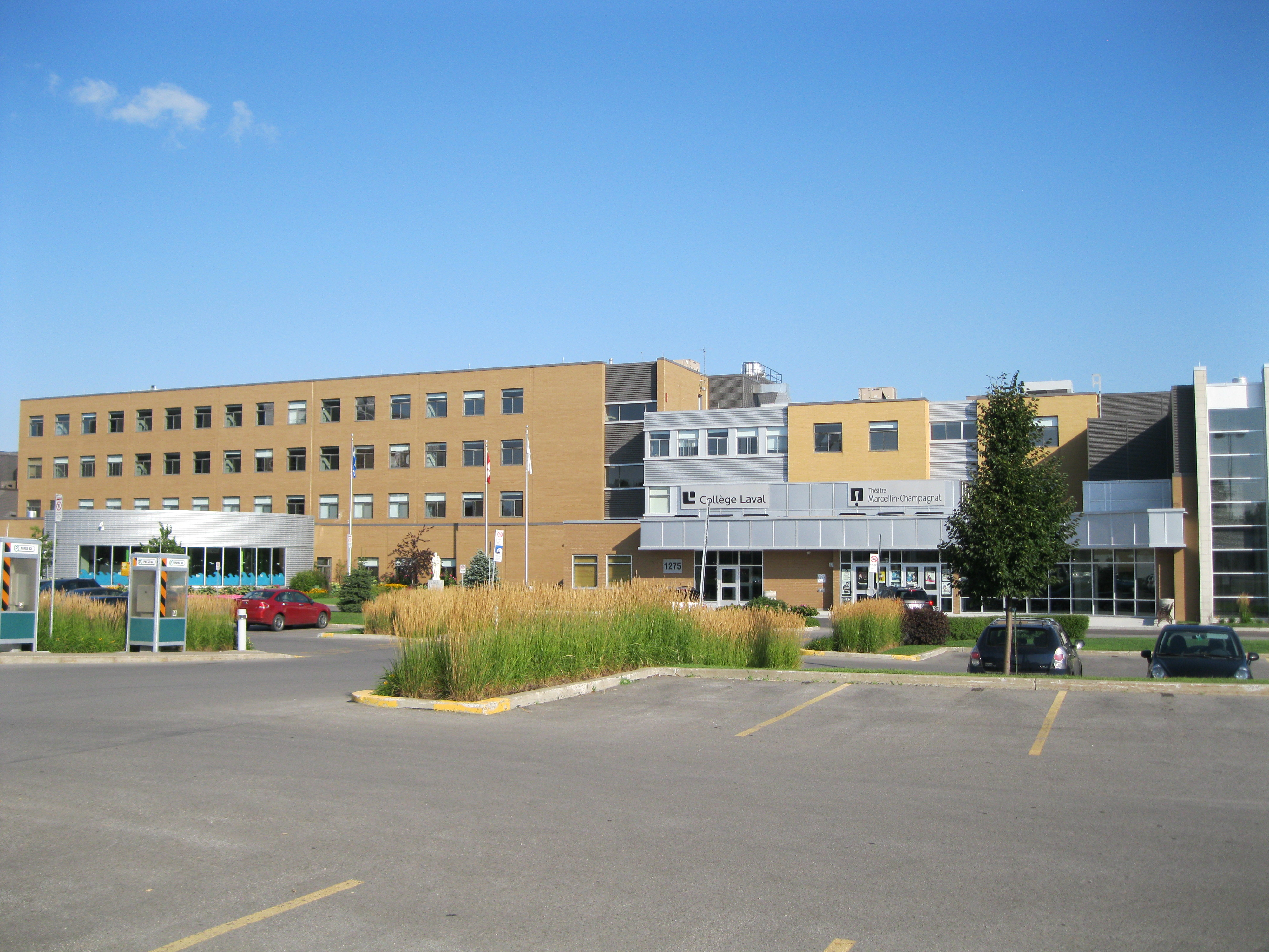 Le collège Laval est une école secondaire privée située dans le quartier Saint-Vincent-de-Paul à Laval, au Québec.